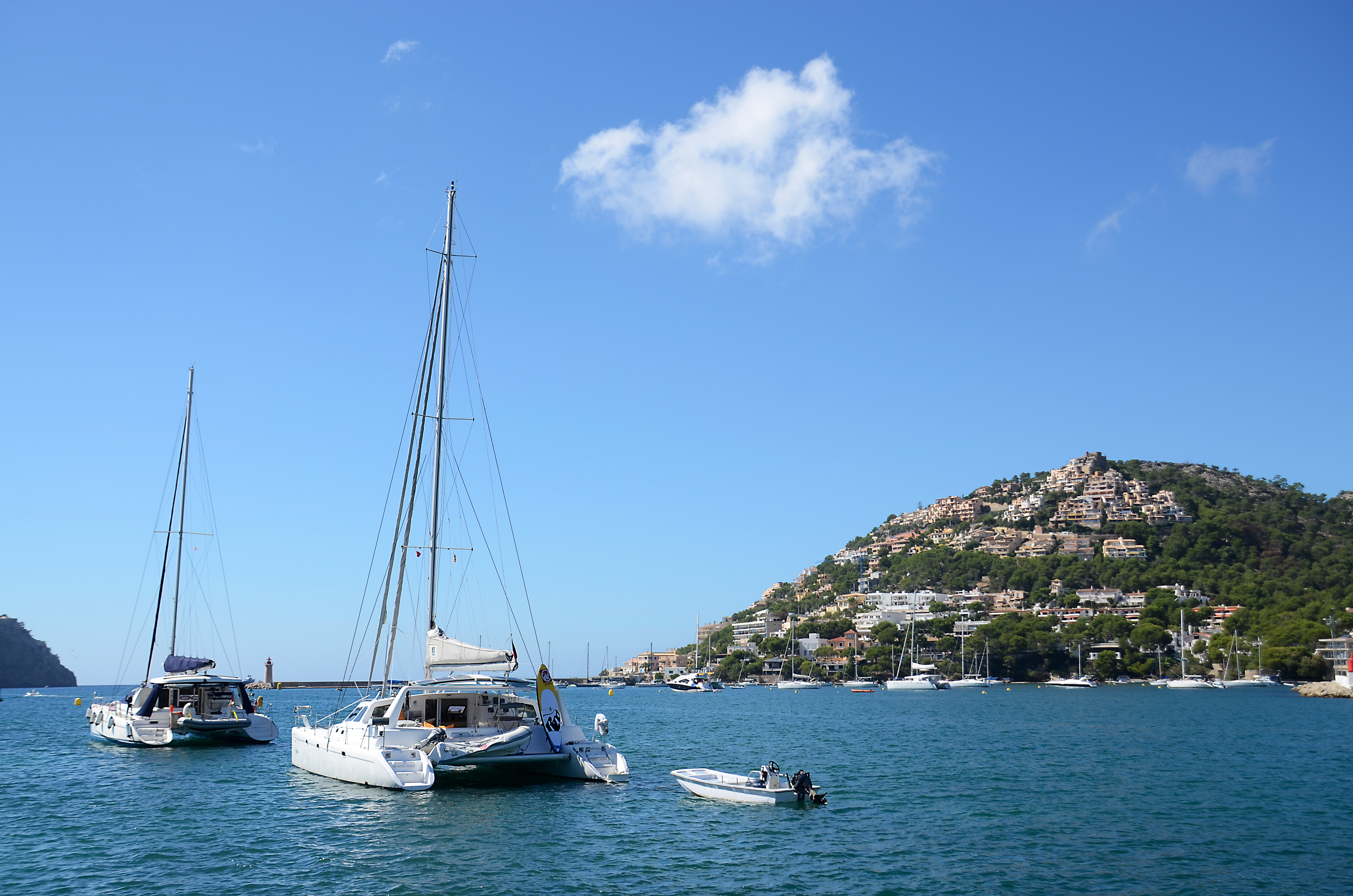 Port d'Andratx, Mallorca